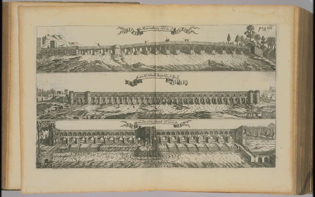 پلهای اصفهان به قلم انگلبرت کمپفر